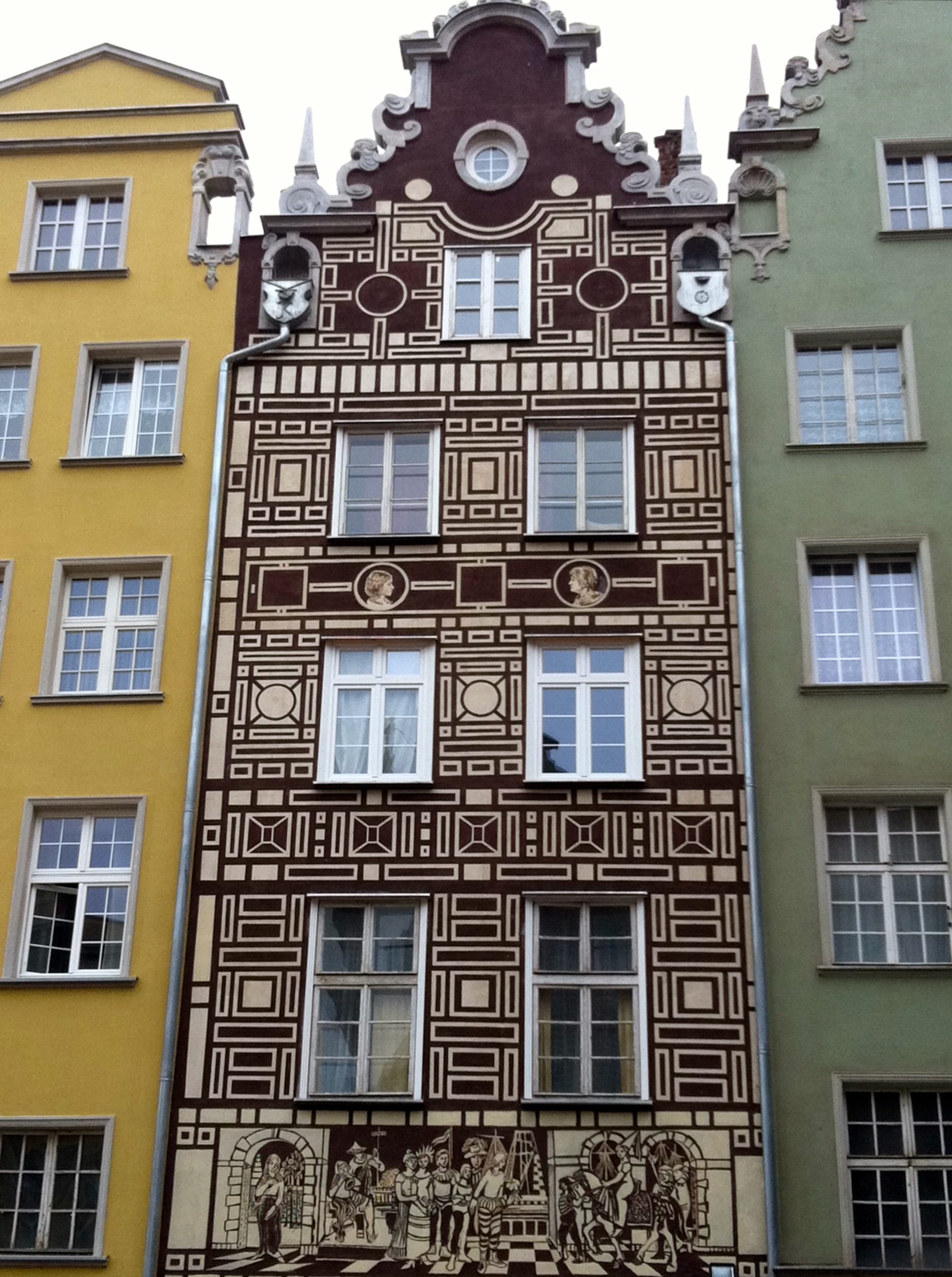 Gdańsk Główne Miasto - kamienice przy Długim Targu, od lewej: - Długi Targ 27 (fragment) - Długi Targ 26 - Długi Targ 25 (fragment)